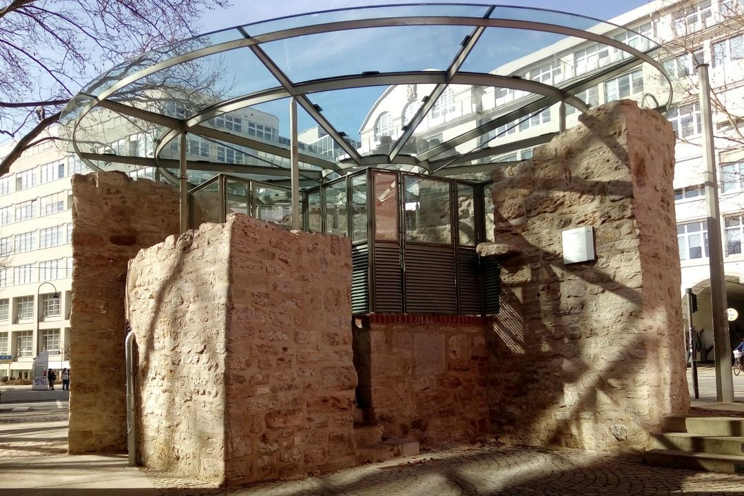 Anatomieturm (mit Glasdach) Jena, März 2017